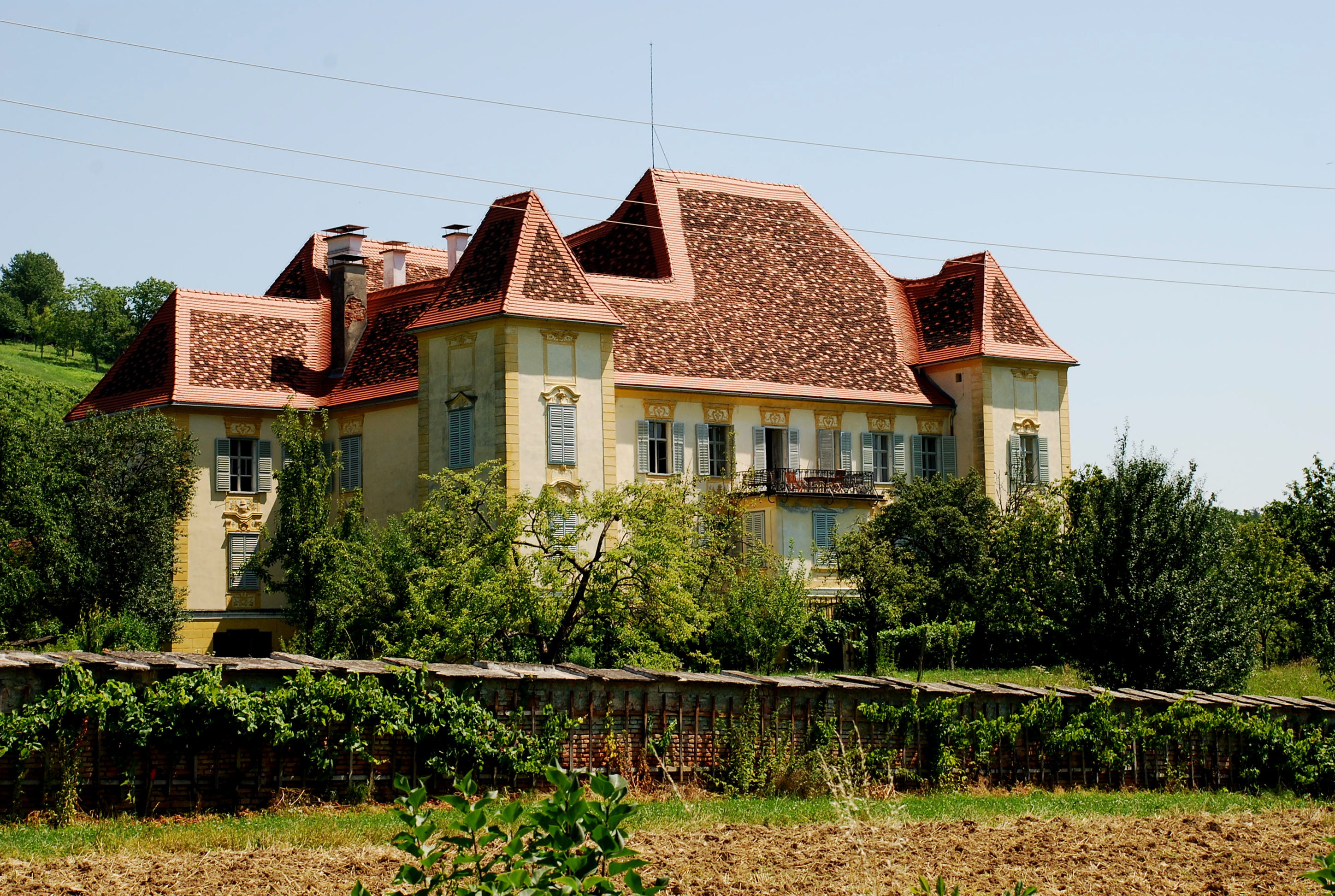 Schloss Wildbach Deutschlandsberg von Süden Object location46° 50′ 56.39″ N, 15° 12′ 15.33″ E